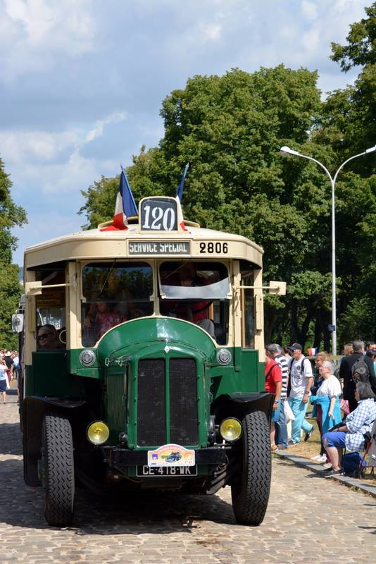 9ème "traversée de Paris estivale" en véhicules de collection, organisée par l'association Vincennes en anciennes. Arrivée au Parc de l'observatoire de Meudon.